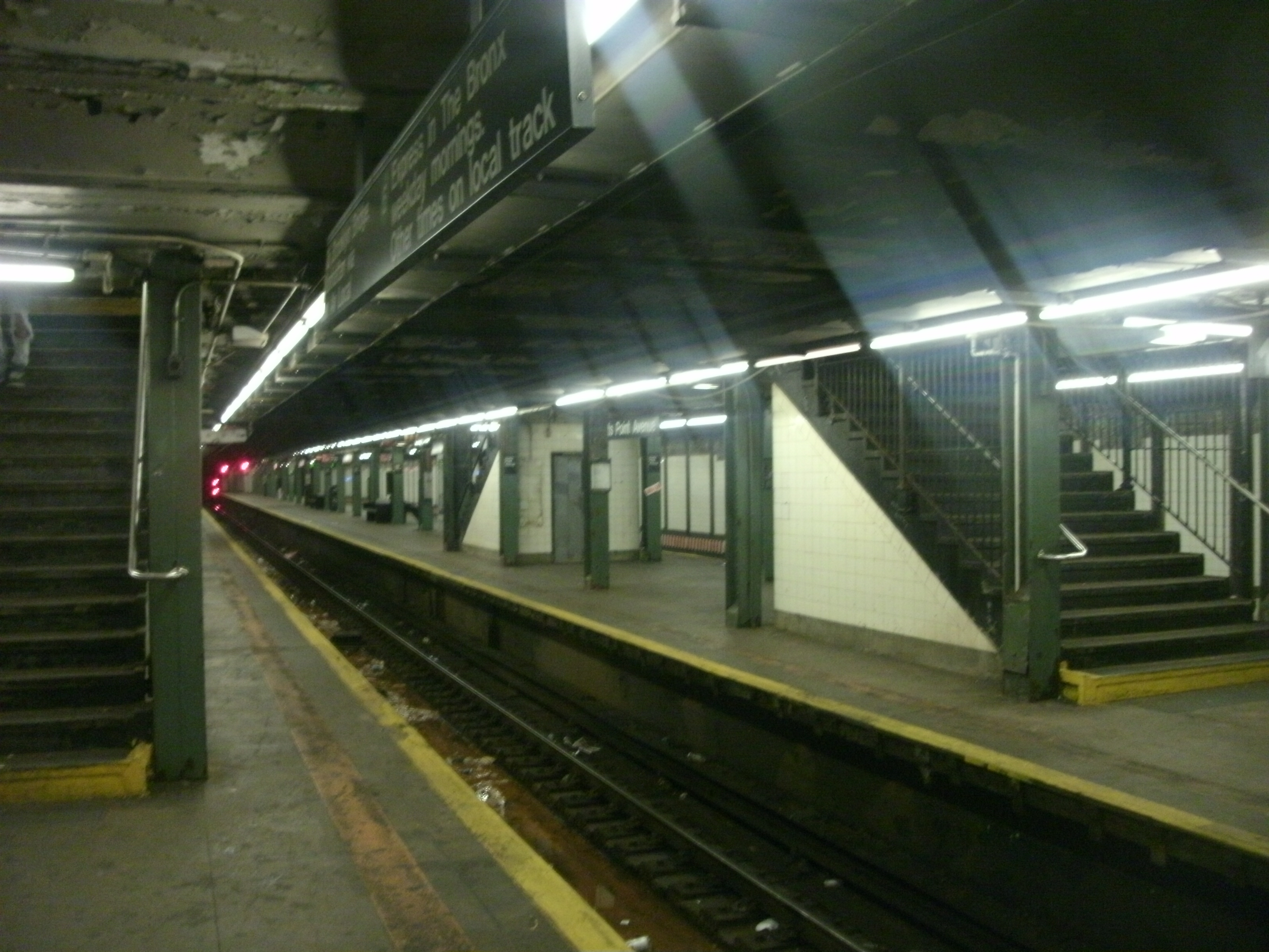 Ge digital camera